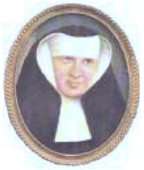 Josefa Dobrovlastka Pedálová, česká katolická řeholnice a první česká vlastenecká spisovatelka.